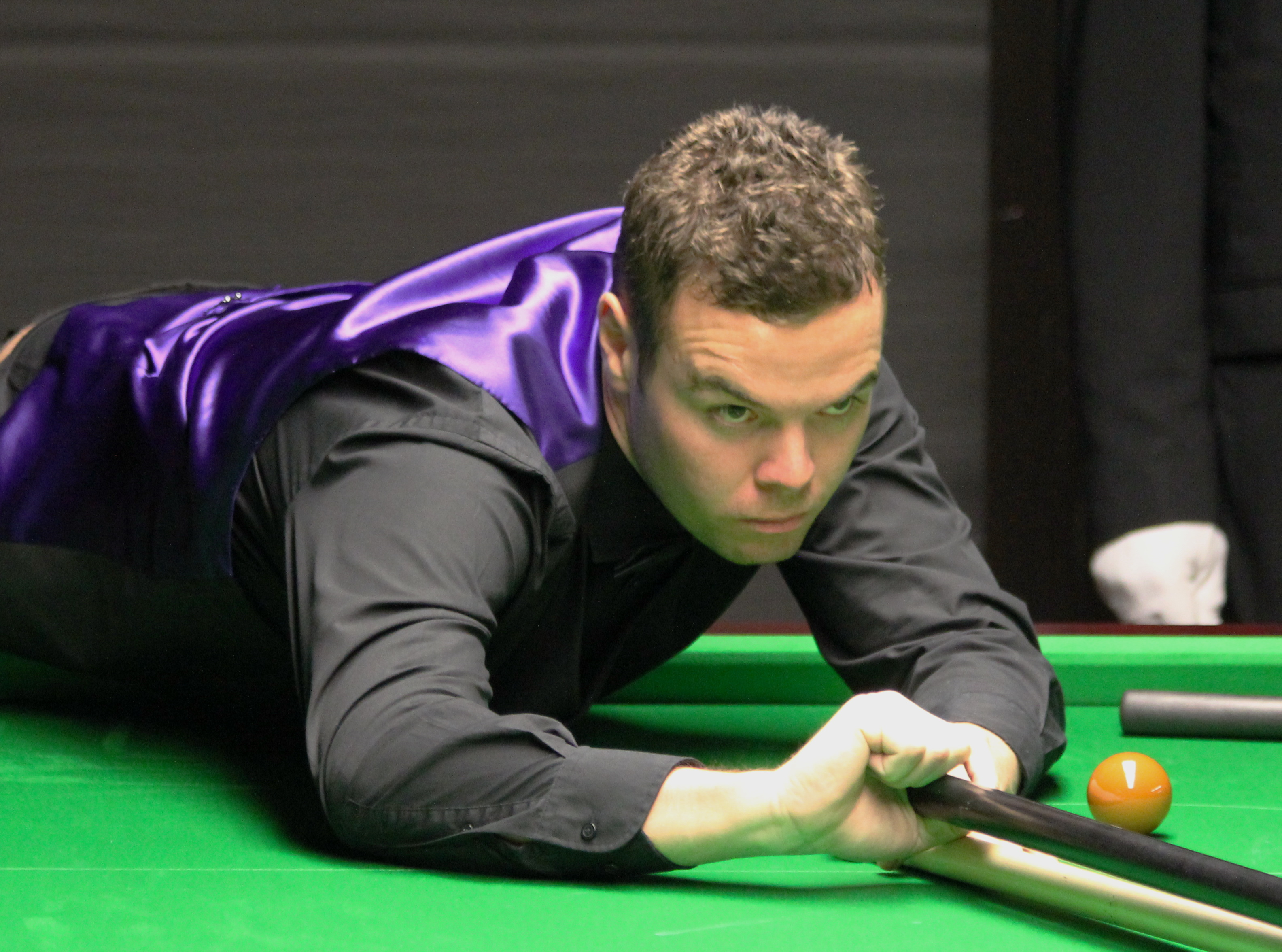 Jamie Cope beim Paul Hunter Classic 2012